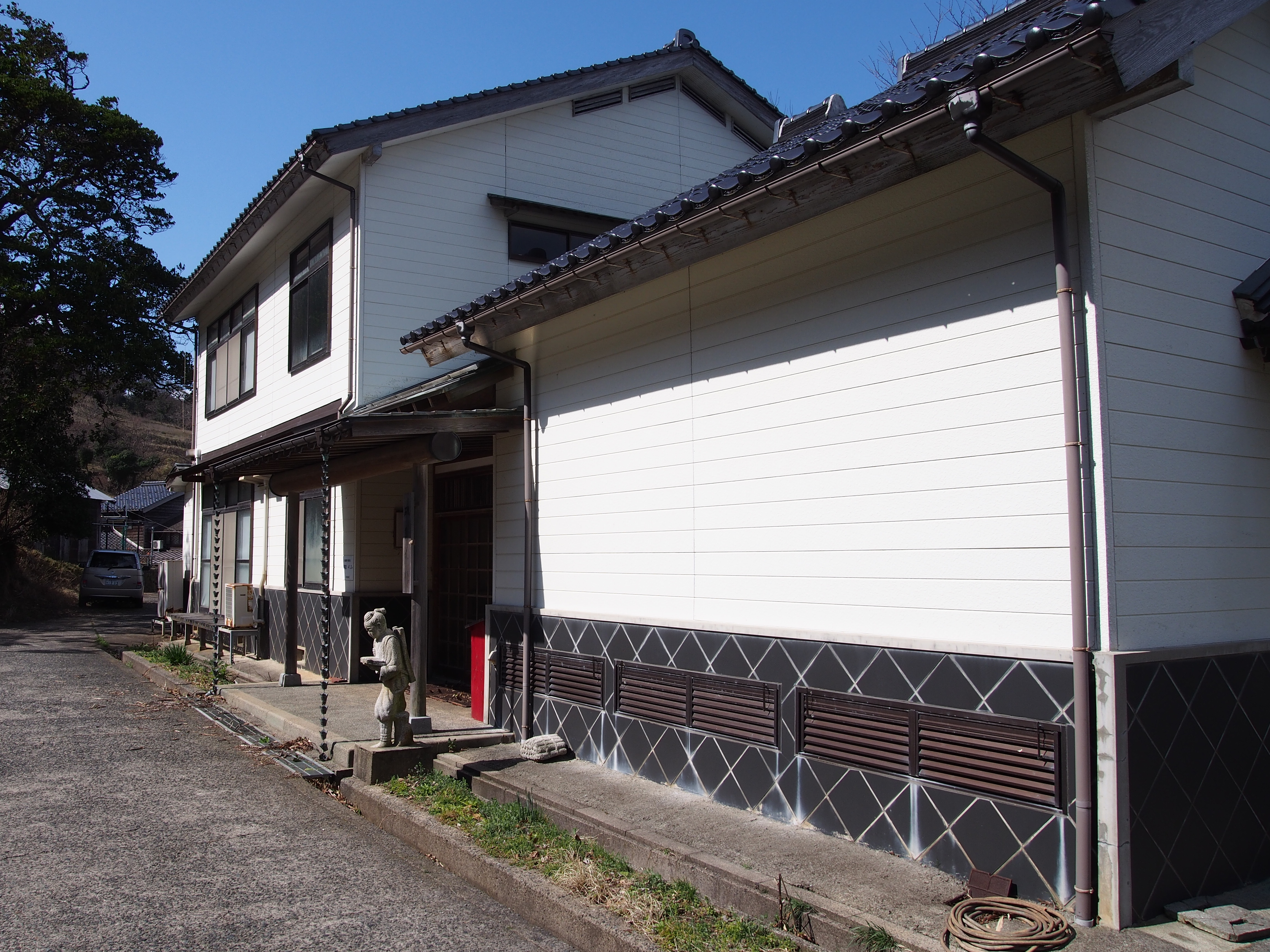 磯集会場（京都府京丹後市網野町磯）